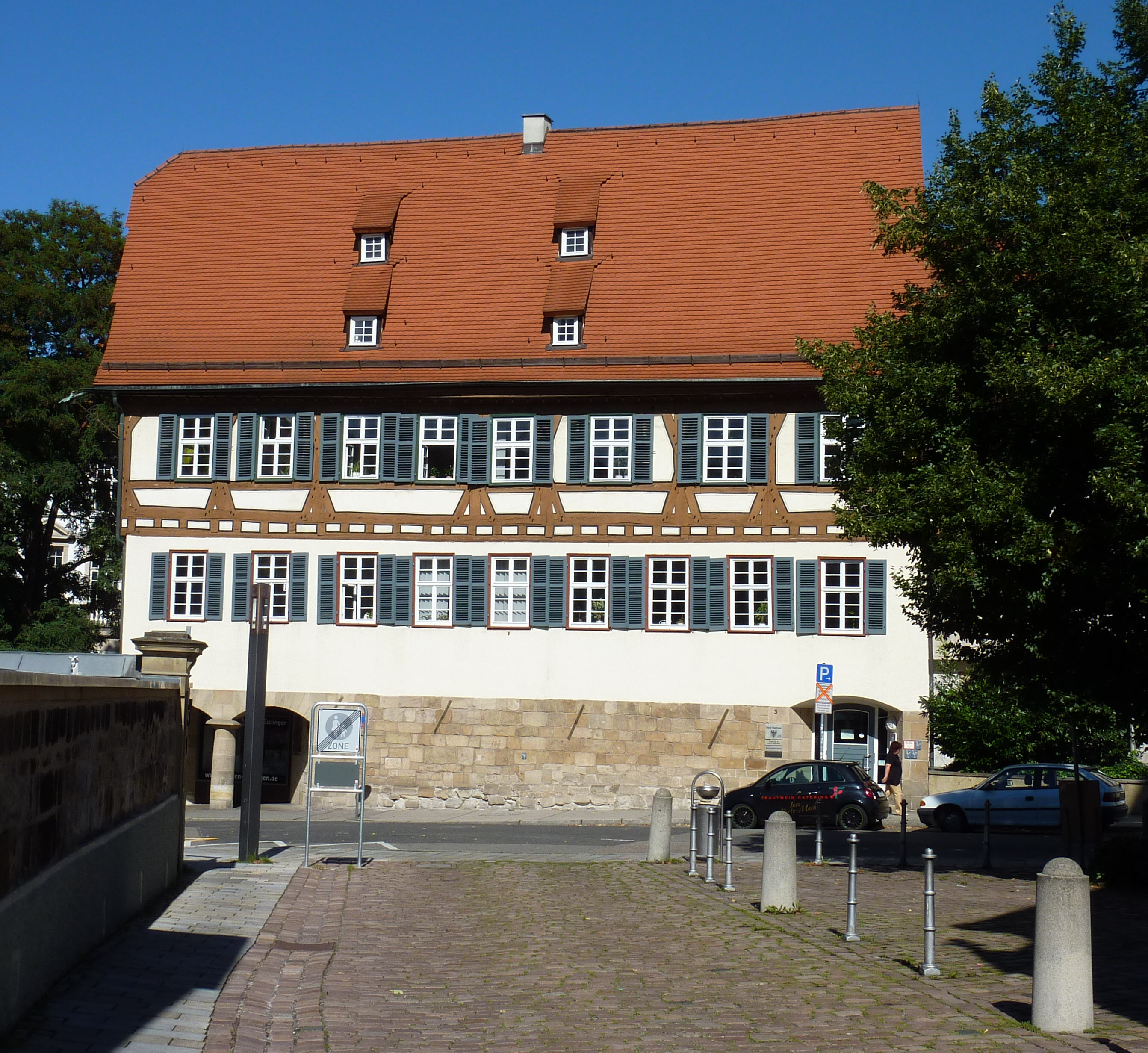 ehemalige Lateinschule in Esslingen